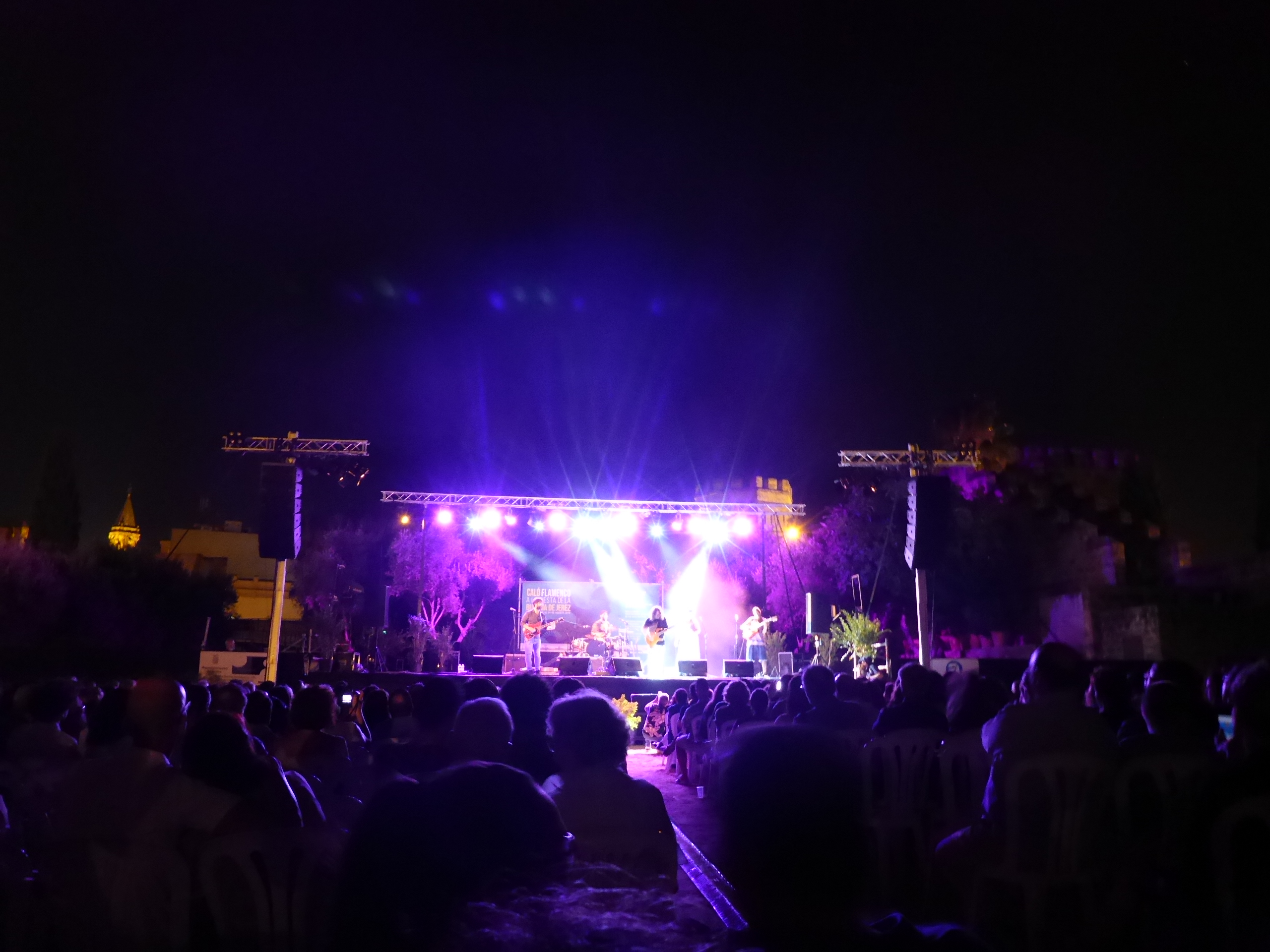 Concierto de Raimundo Amador en el ciclo Noches de Bohemia, Alcázar de Jerez de la Frontera (España)